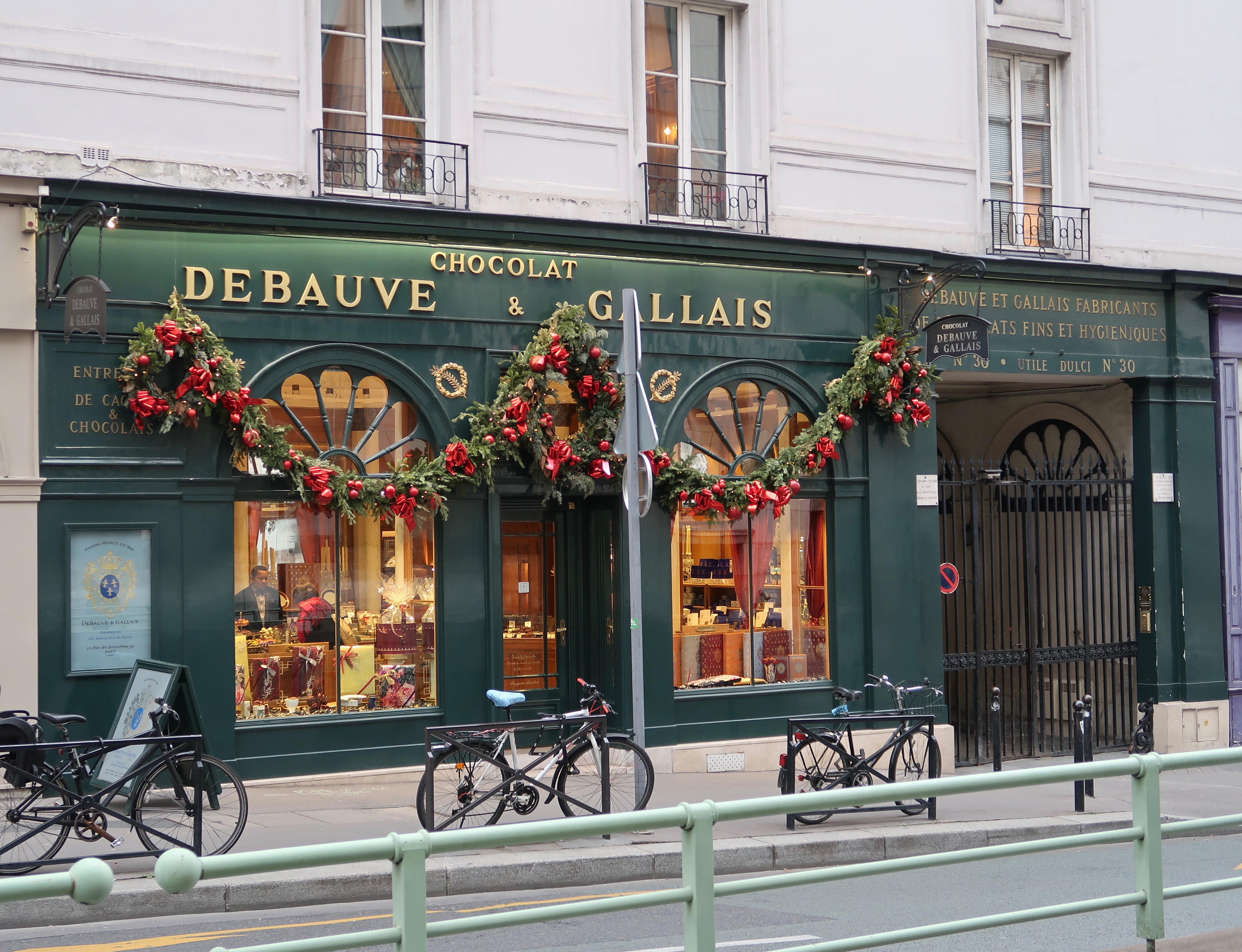 Debauve & Gallais, 30 rue des Saints-Pères (Paris, 7e).